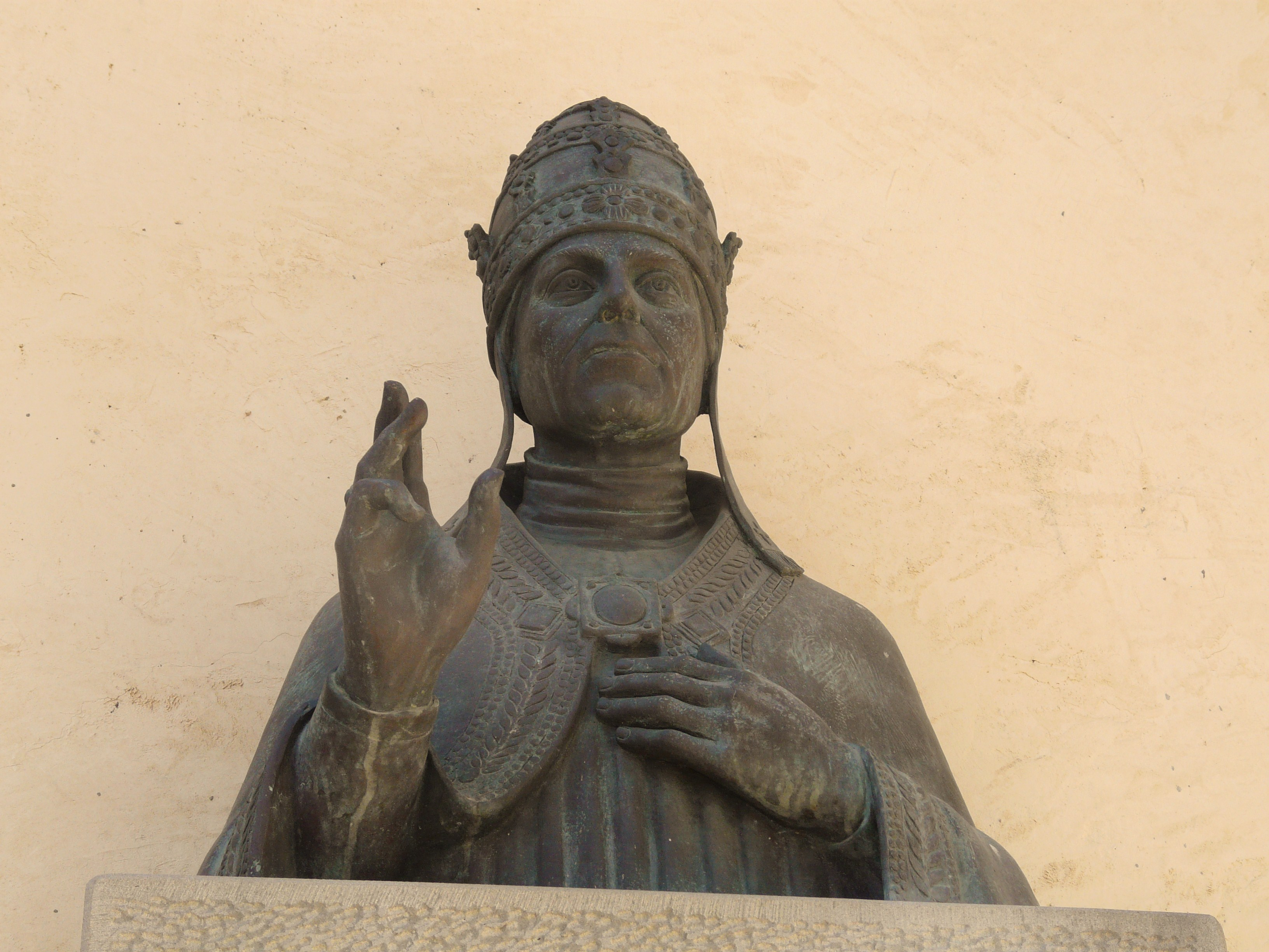 Statua in bronzo di papa Niccolò V, Ostello di Fivizzano, Toscana, Italia